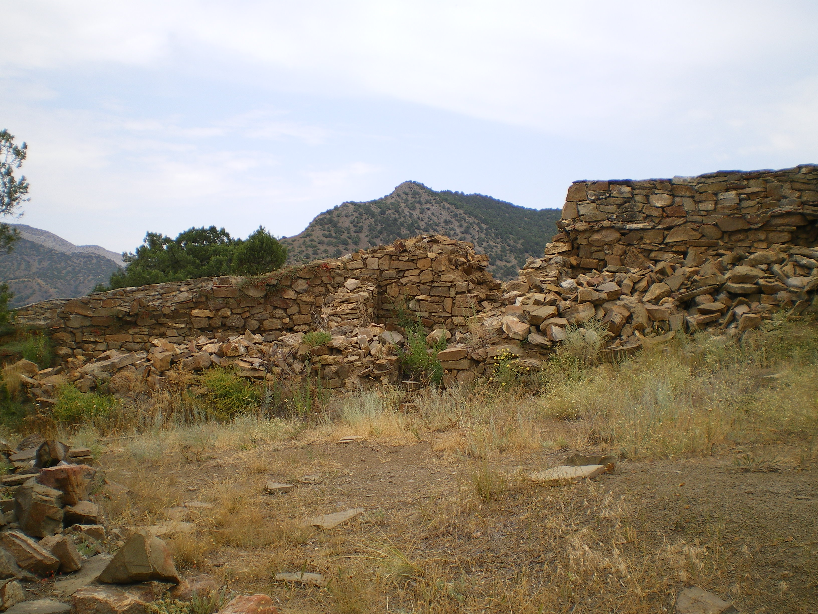 Фортеця «Кутлак», Веселе, між селом Веселе і смт Новий Світ